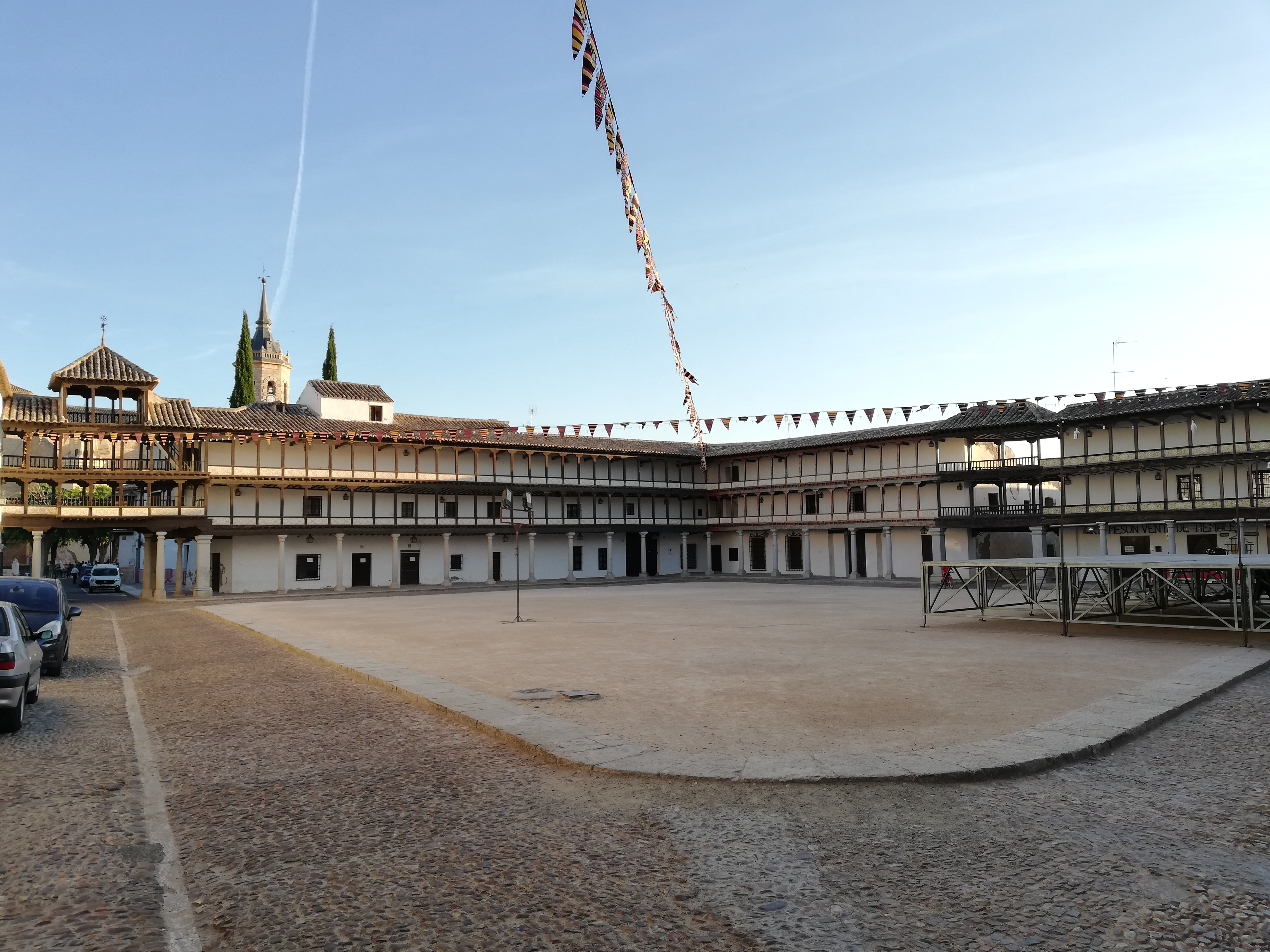 Plaza Mayor de la localidad toledana de Tembleque